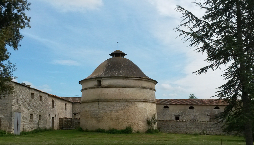 Pigeonnier du Château d'Allerit à Vallans (Deux-Sèvres)